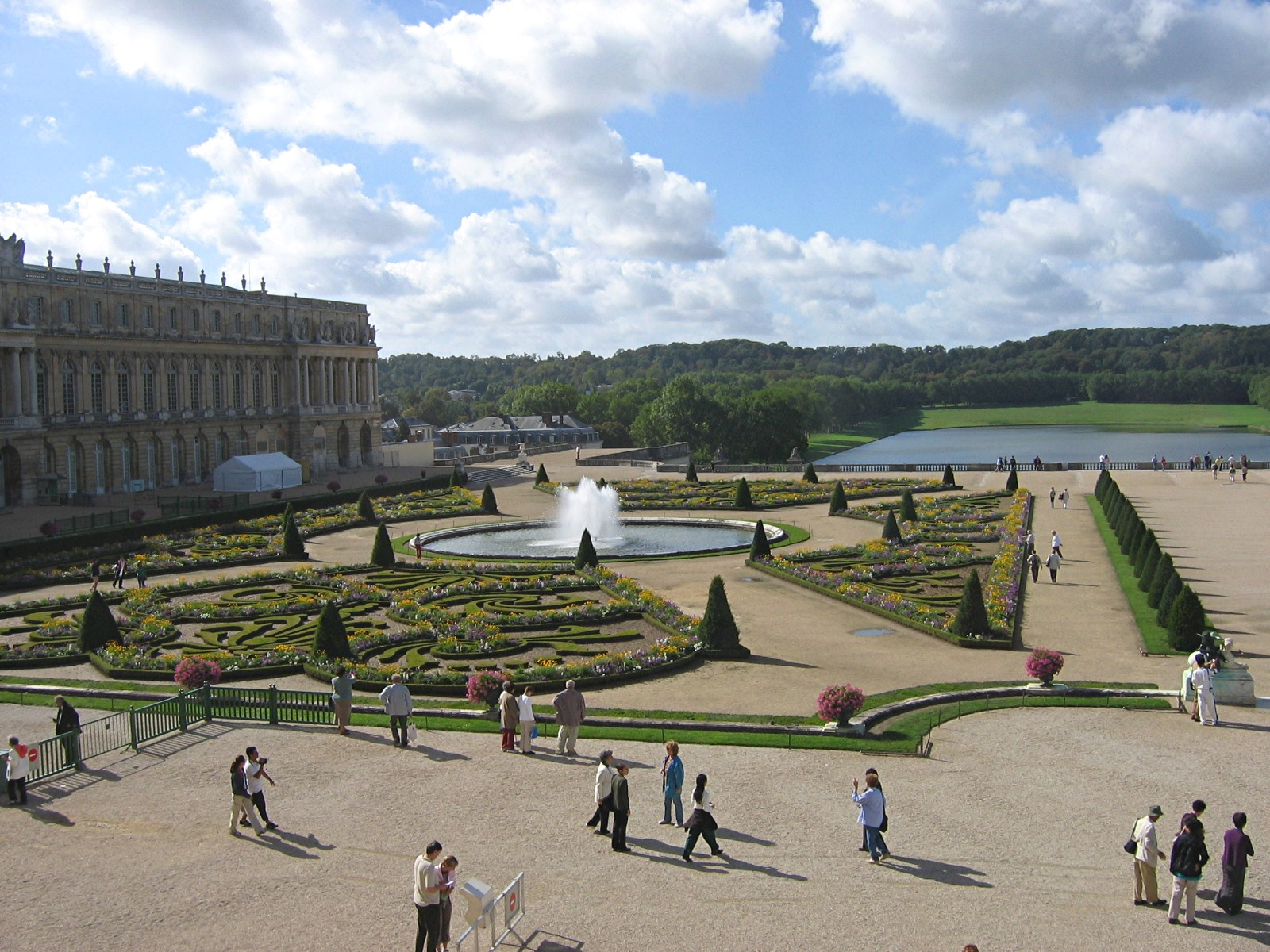 Parterre du Midi, jardins de Versailles / Photographie personnelle prise par Georges Puissant ; 63160 Billom